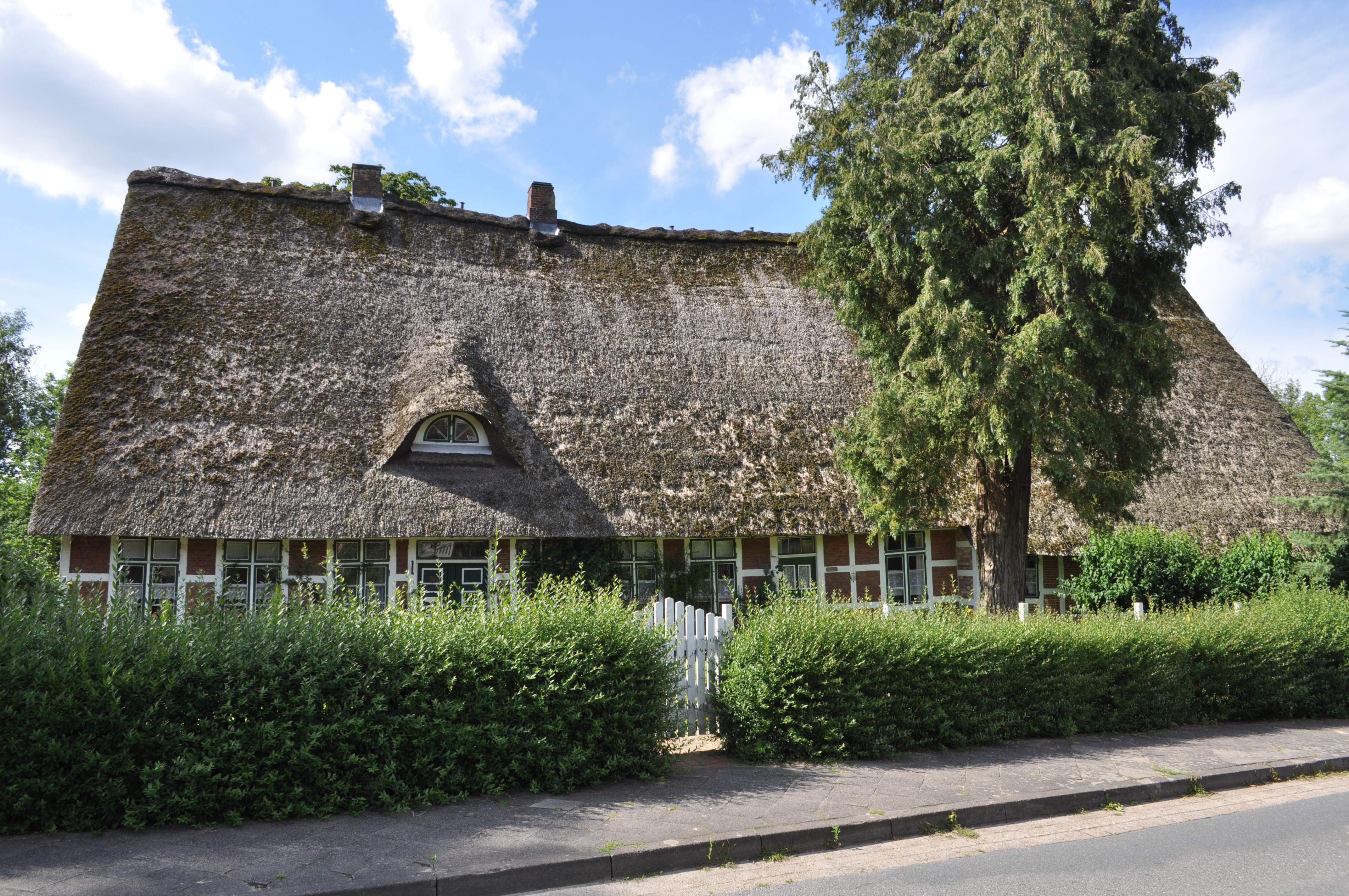 Wohnhaus Hemmer Straße 5 in Hemmoor-Warstade. This is a photograph of an architectural monument. .202.200.009